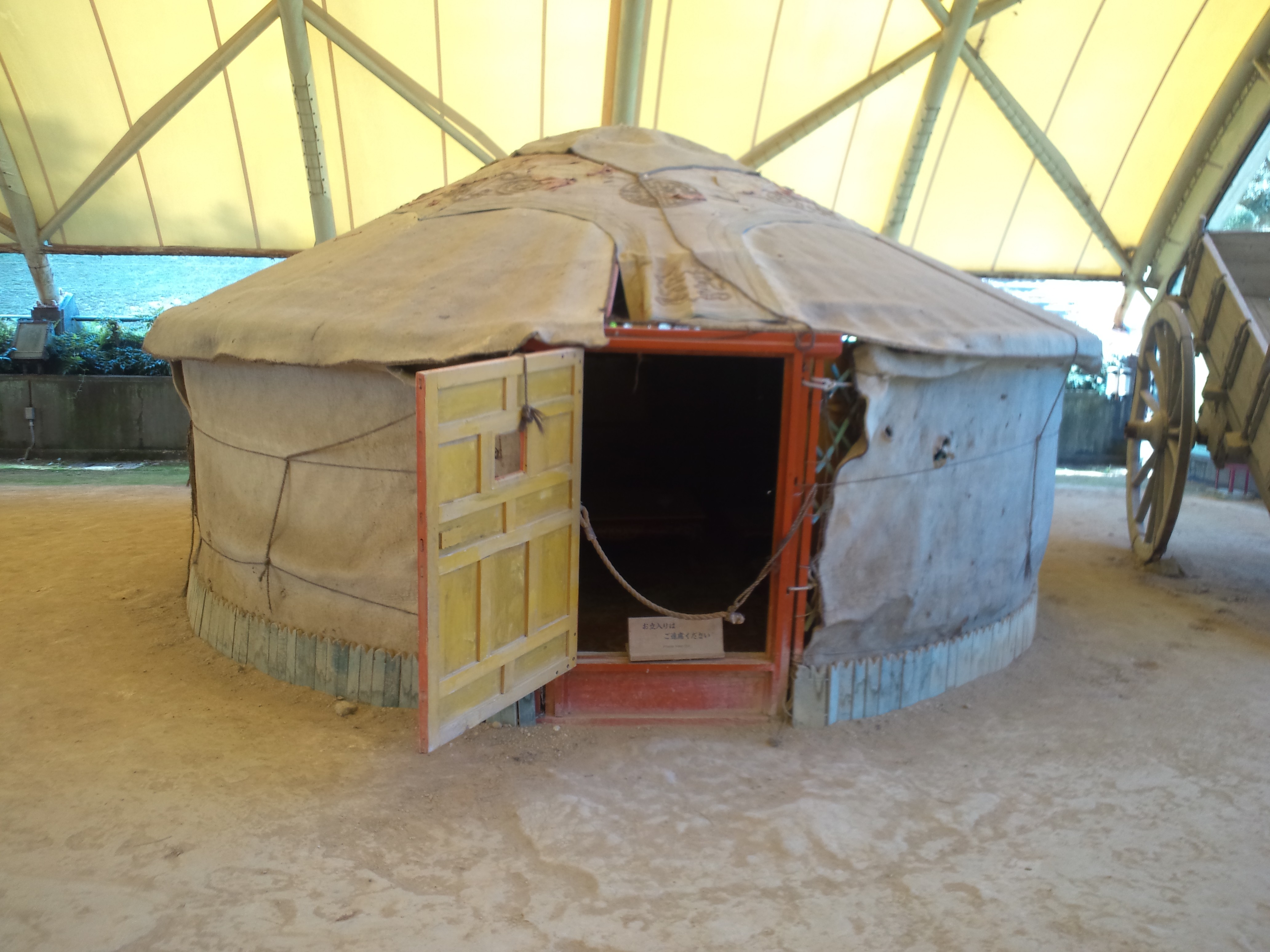 リトルワールド テント村 中国 モンゴルのテント